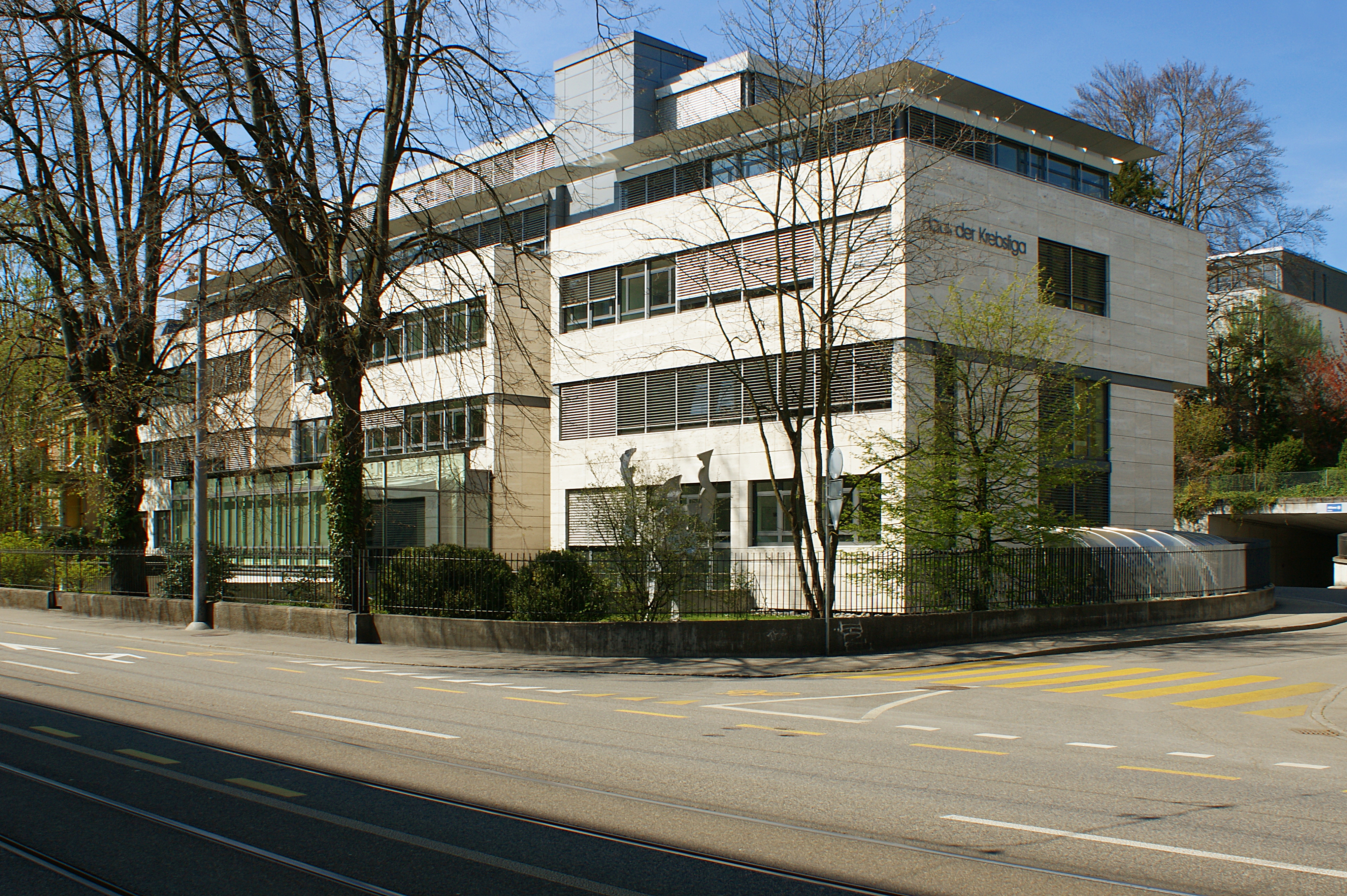 Situation Aluminiumblechplastik Diskutierender (Kurt Laurenz Metzler 1996) vor dem Gebäude Haus der Krebsliga Effingerstrasse 40